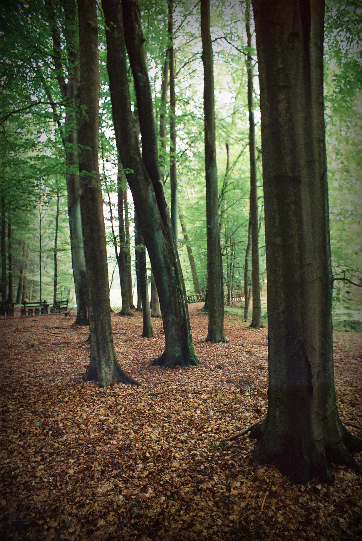 Autor: Adrian Grzegorz